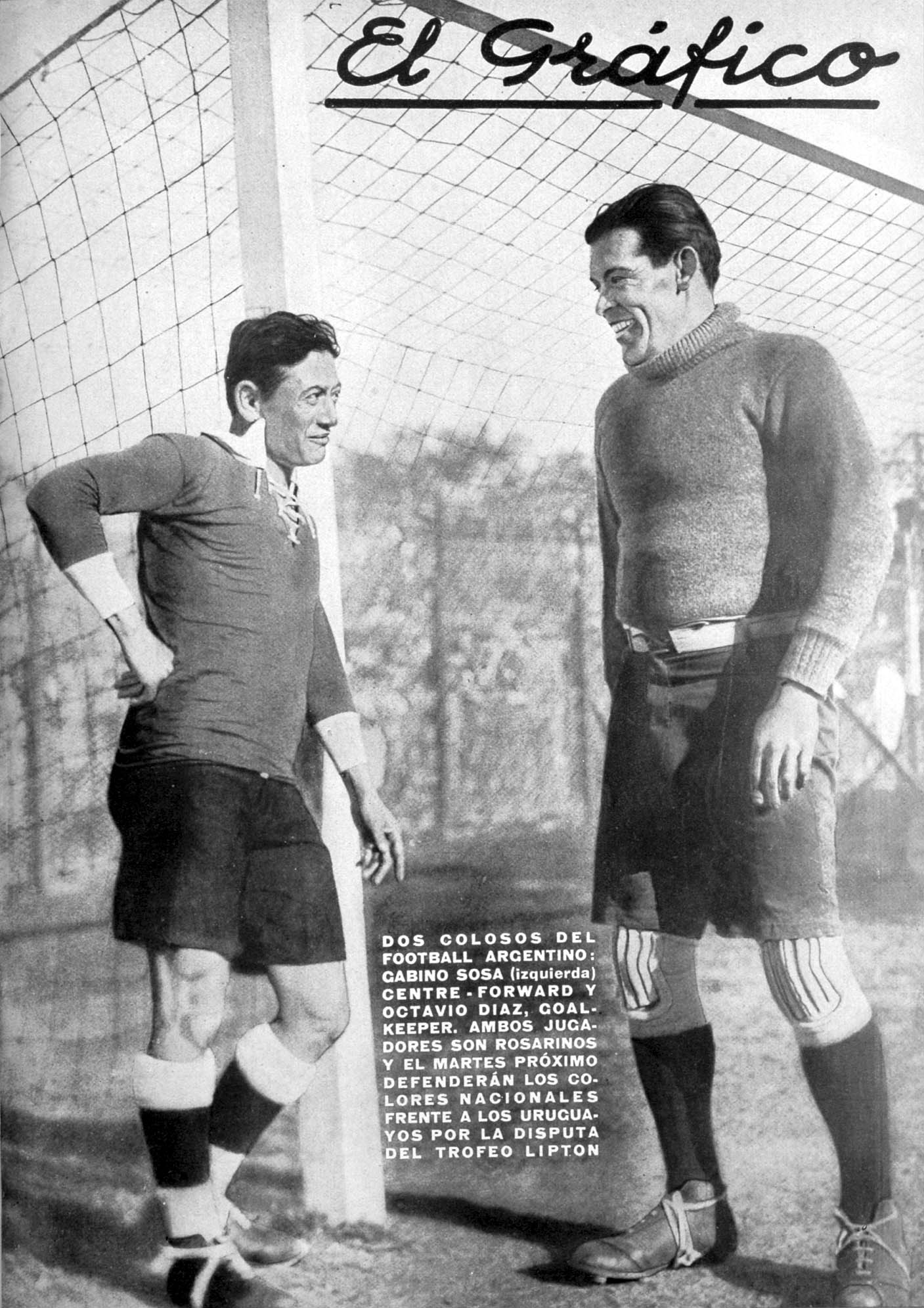 El Grafico del 27 de Agosto de 1927. Edicion 425